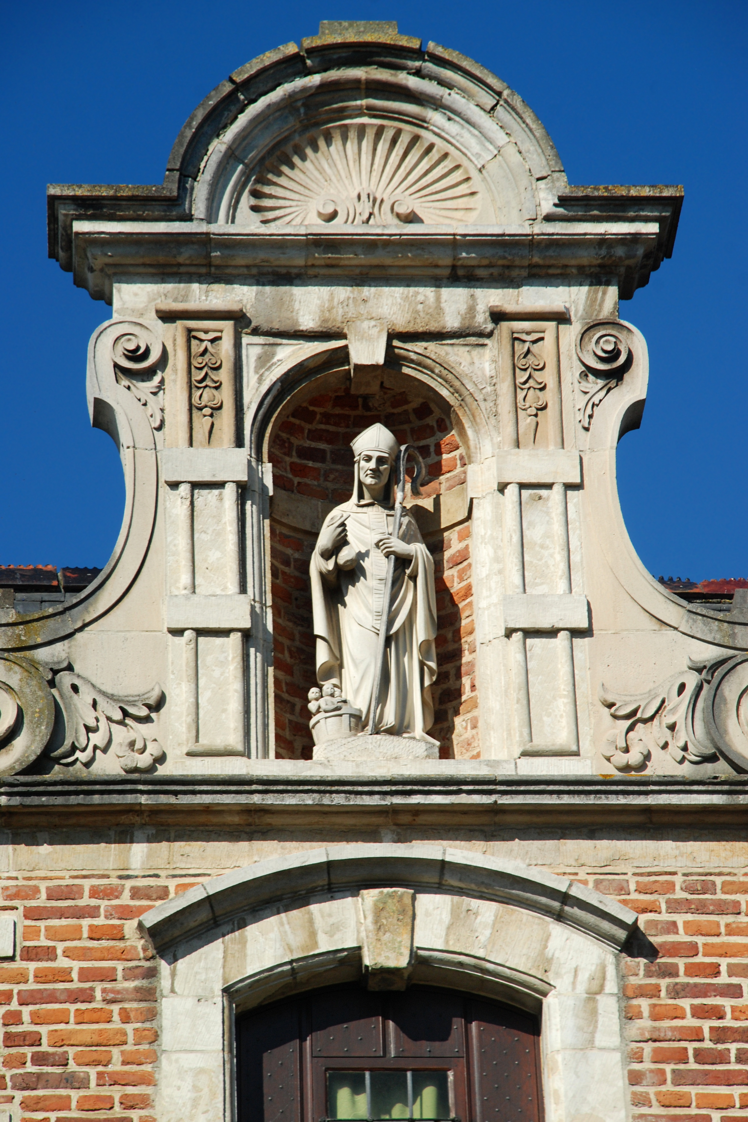 Belgium - Leuven - Groot Begijnhof - Maison Saint-Nicolas - Benedenstraat n° 59